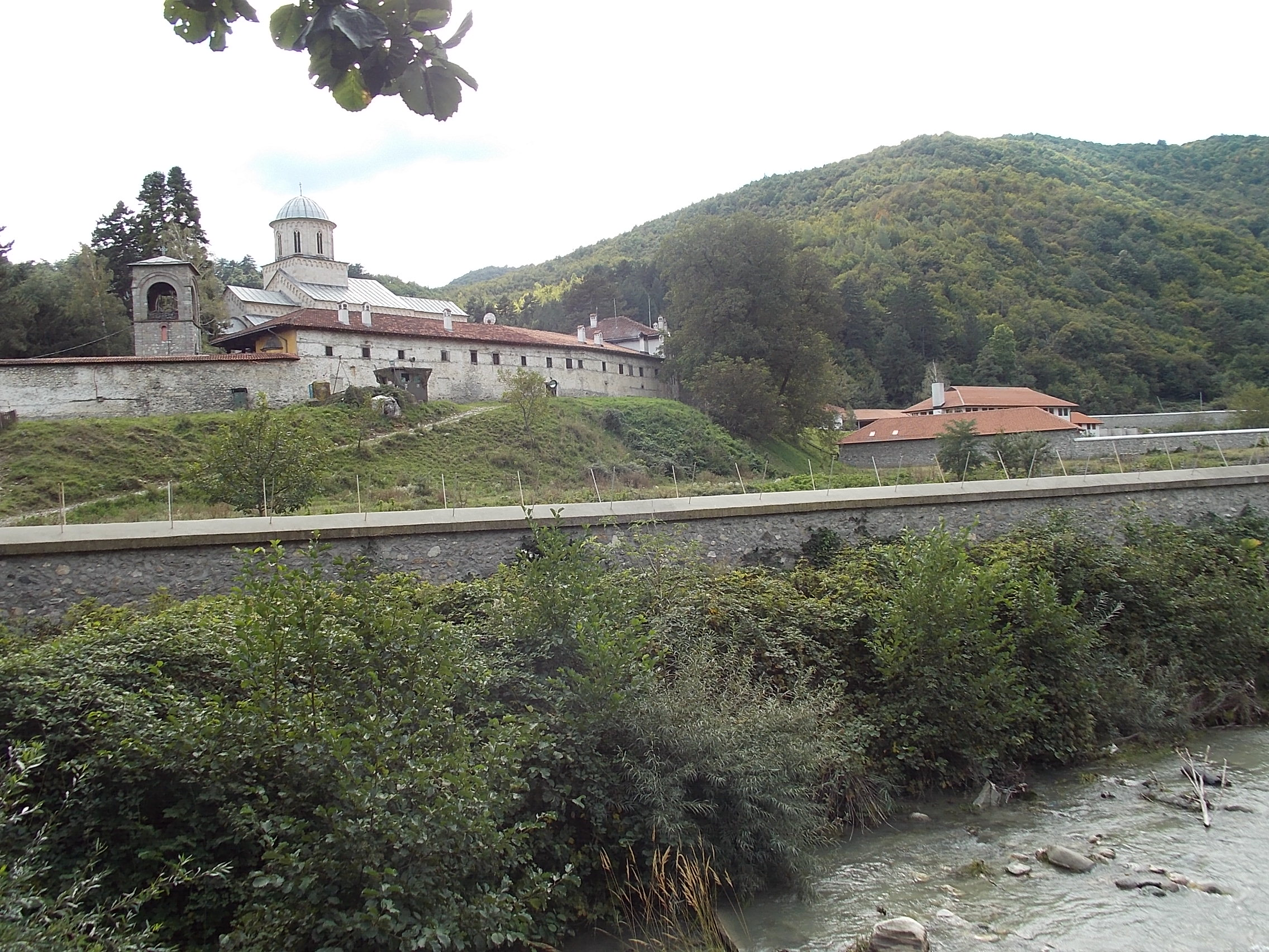 Visoki Dečani